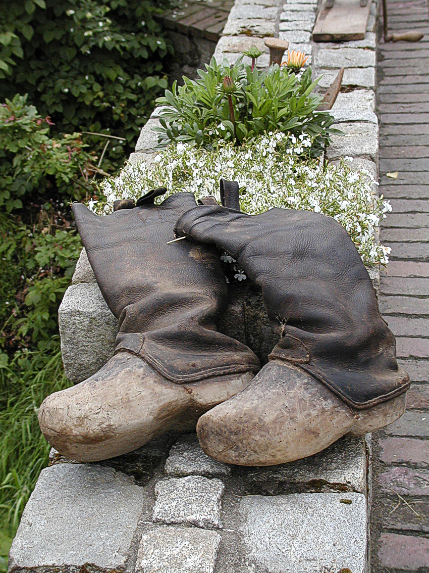 Ein Holzschuh -stiefel, gesehen in Osterbruch zur 800-Jahr-Feier des Ortes